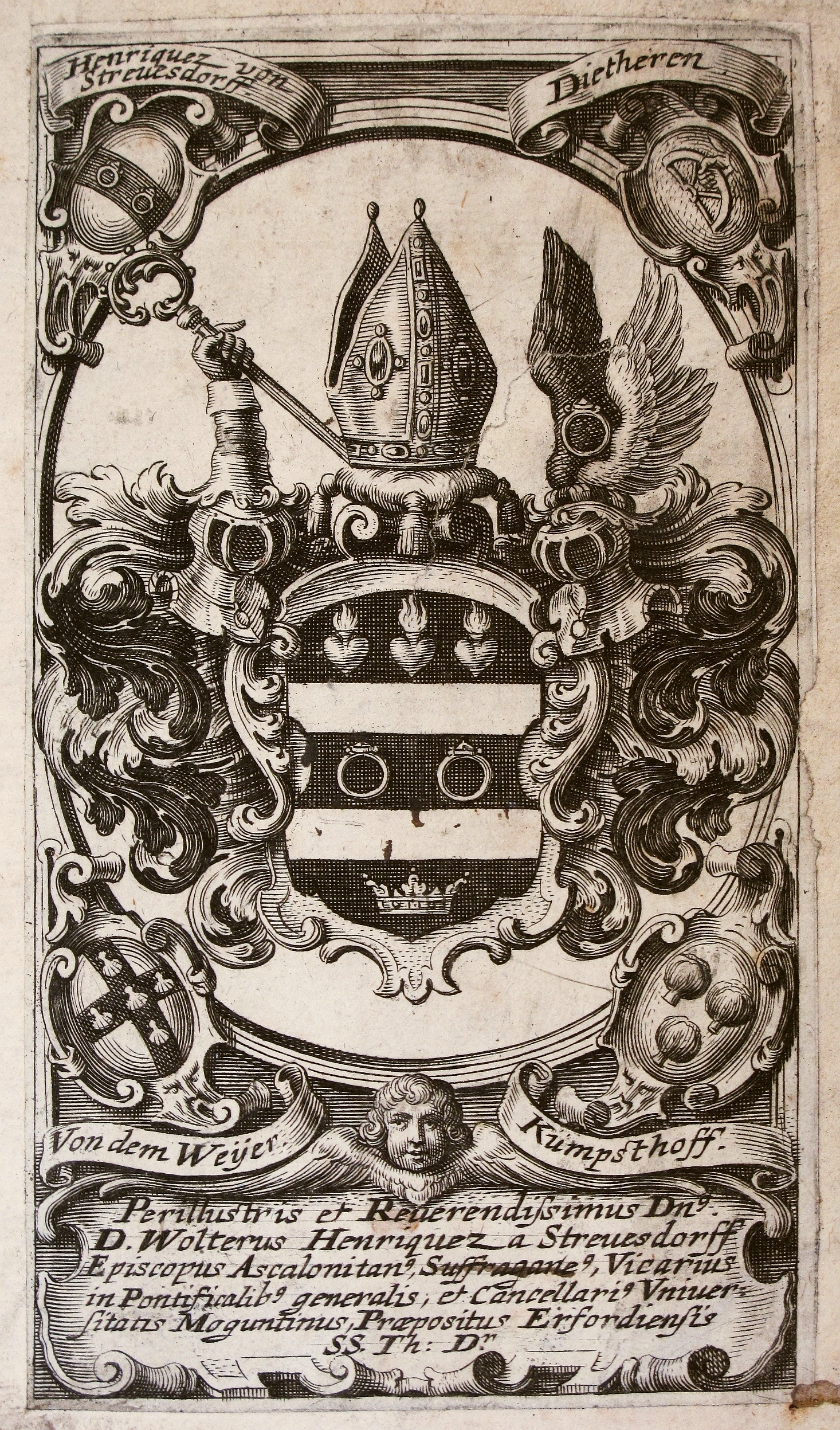 Wappen des Weihbischofs Heinrich Wolter von Streversdorf (1588 - 1674). Als Exlibris in dem Buch: Constitvtiones Ordinis Eremitarum S. Augustini : Cvm Additionibvs & Notis R. F. M. Hieronymi Romani eiusdem Ordinis Generalis. Coloniæ Agrippinæ : Münich, 1656. Wissenschaftliche Stadtbibliothek Mainz. Signatur: V m 1492